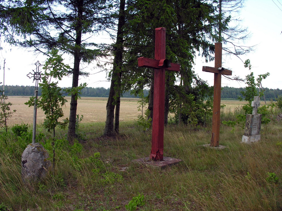 Žalionė, Mažeikių raj., Viekšnių seniūnija Žalionės kaimo kapinaitės Foto: Algirdas, 2006 m. rugpjūčio 15 d., Lietuva